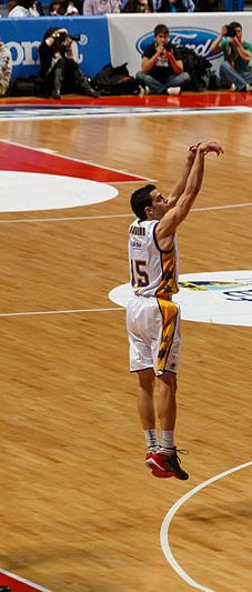 David Navarro Brugal